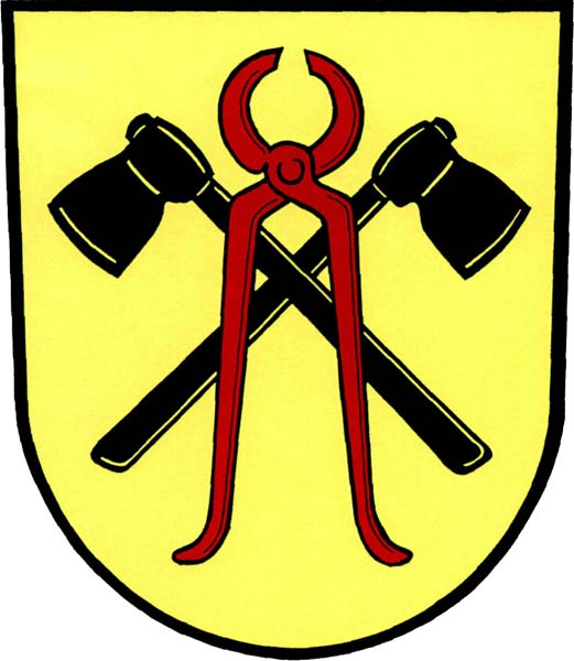 Znak obce Ludvíkov